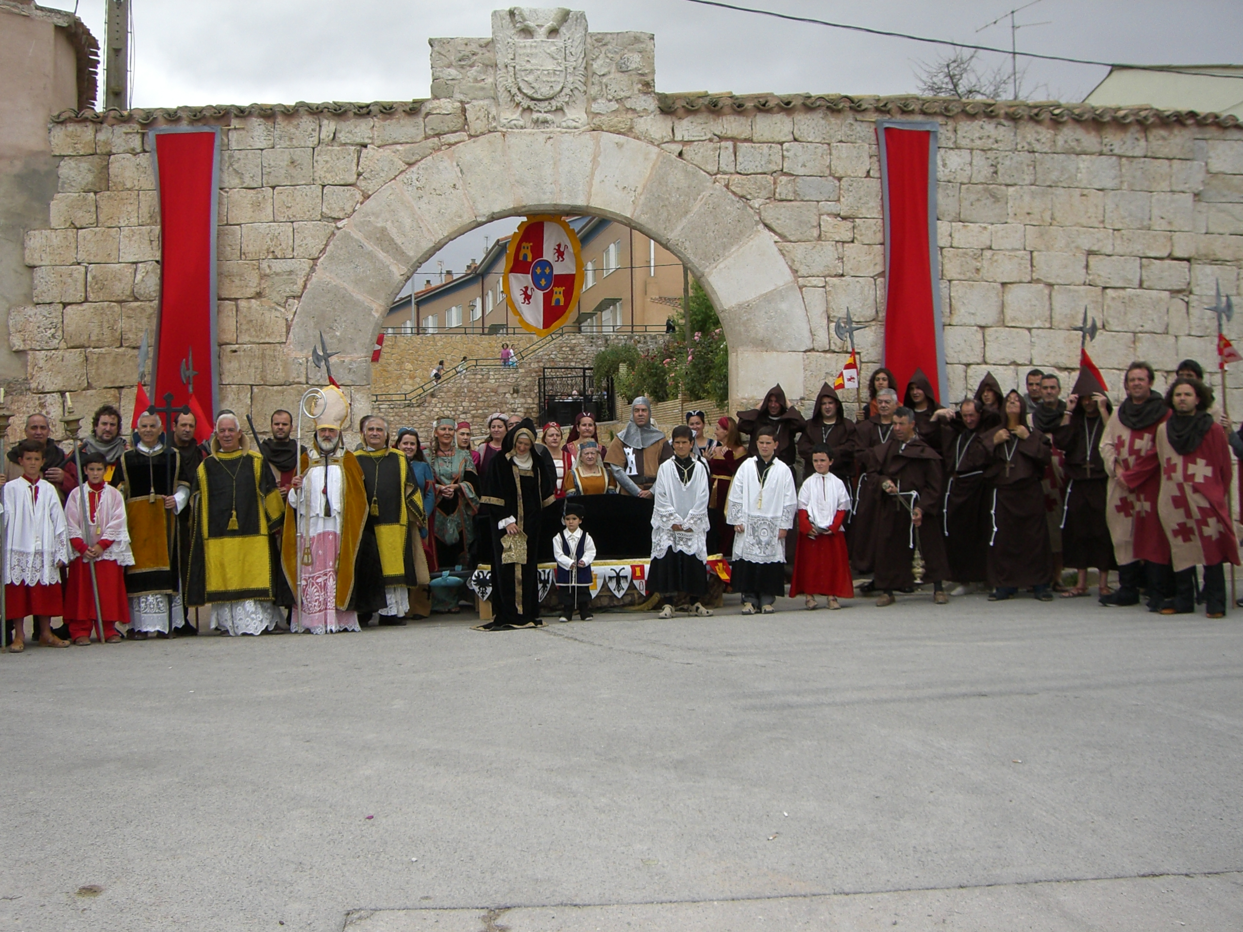 Representacion teatral "ciega razón" Arcos de la Llana 2007